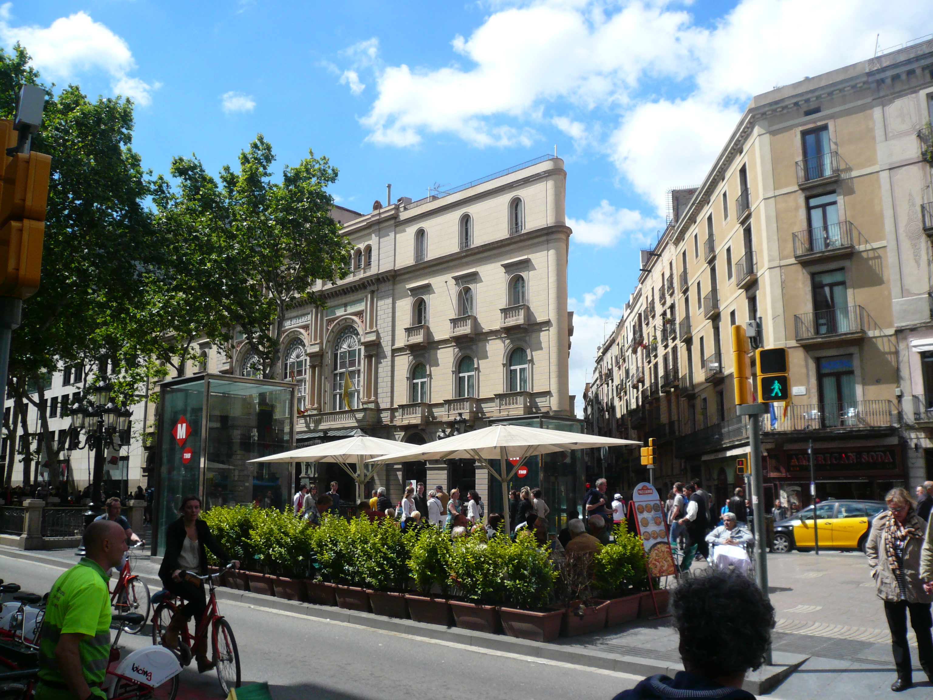 Teatre del Liceu. Rambla, 61-65 (Barcelona). Object location41° 22′ 49.01″ N, 2° 10′ 25″ E